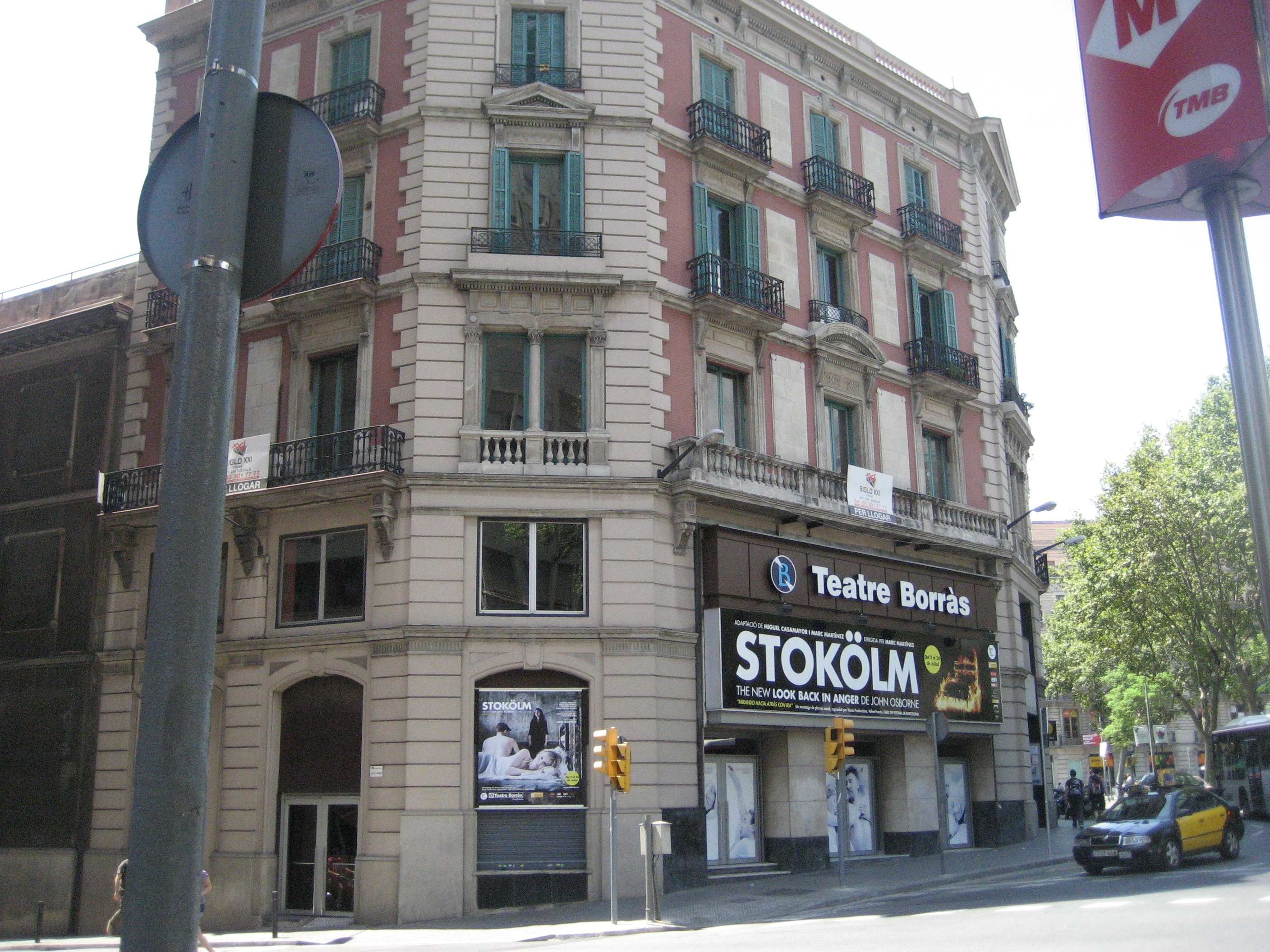 Teatre Borràs de Barcelona_agost 2009